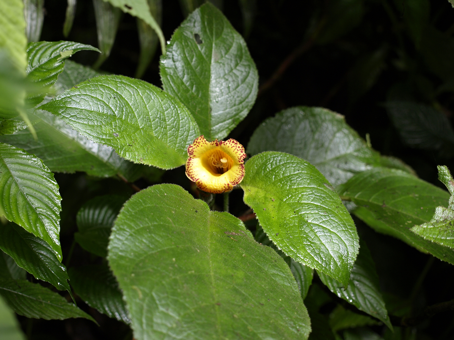 La Paz Waterfall Gardens, Costa Rica